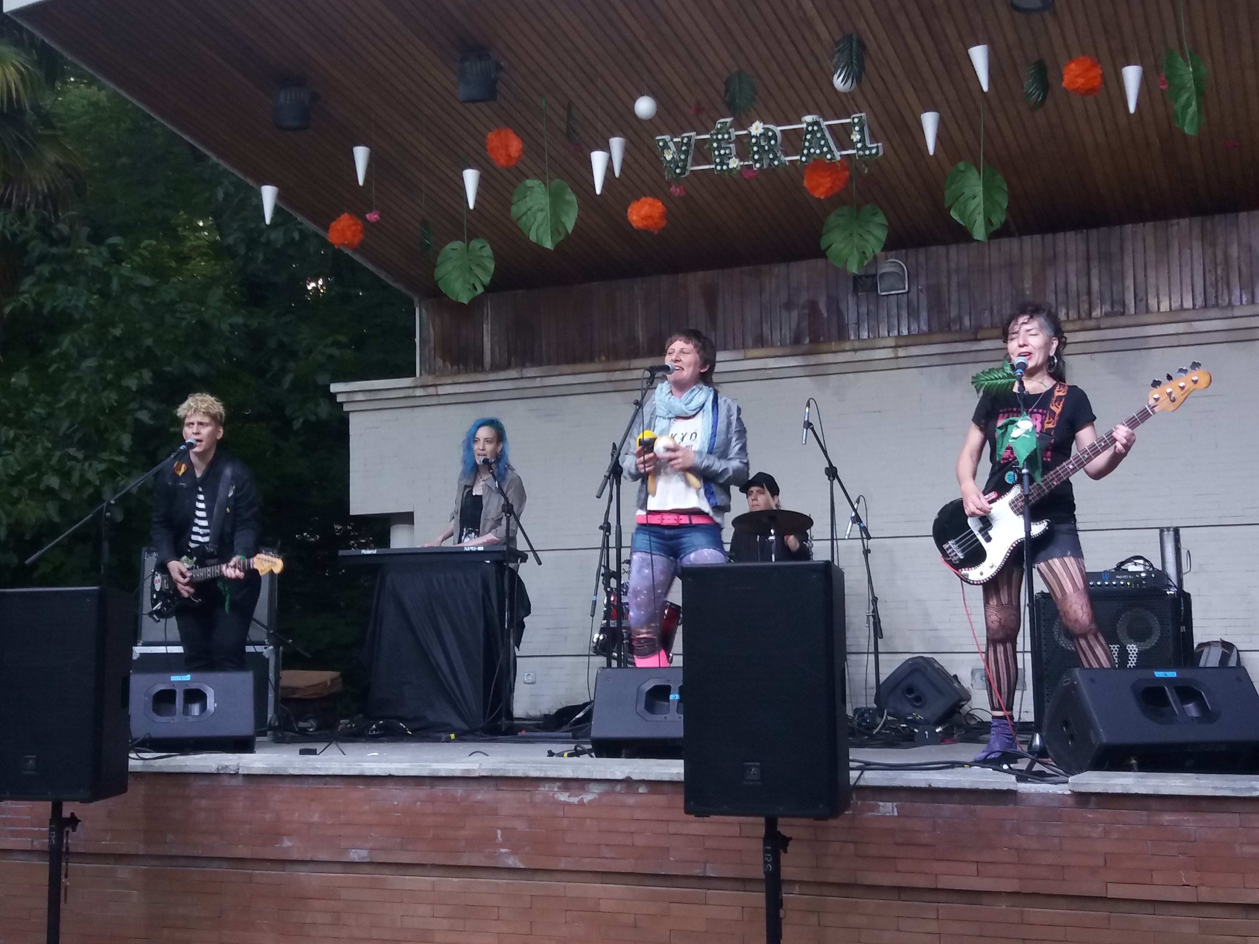 Concierto del grupo argentino Kumbia Queers en la pérgola del Campo Grande de Valladolid (España)